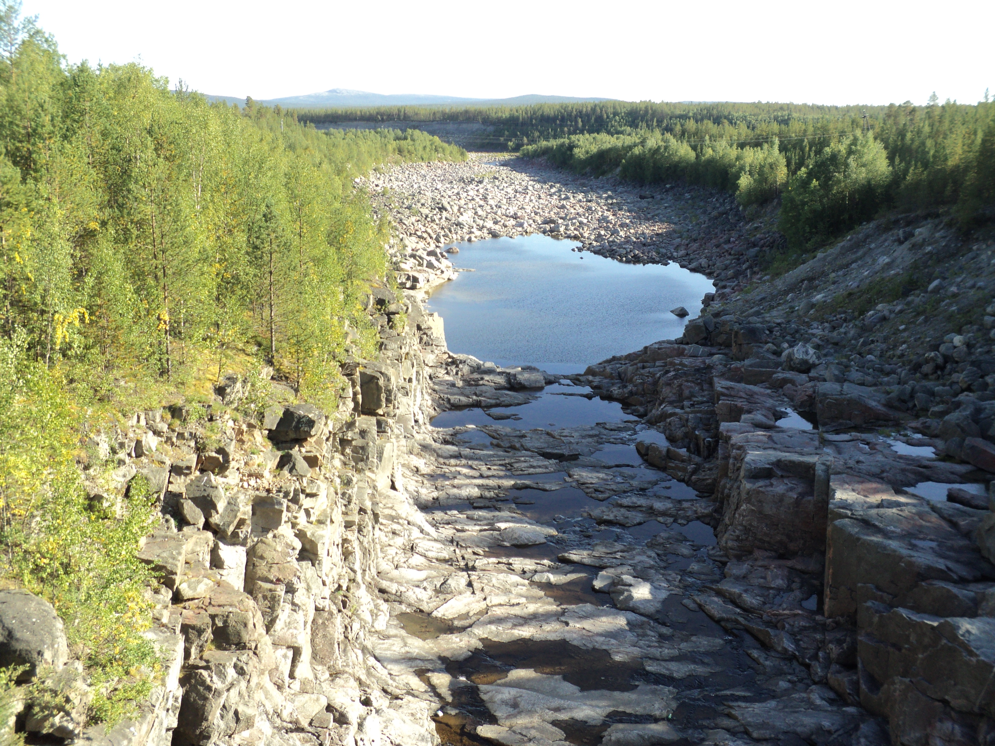 Водосброс Верхнетуломской ГЭС